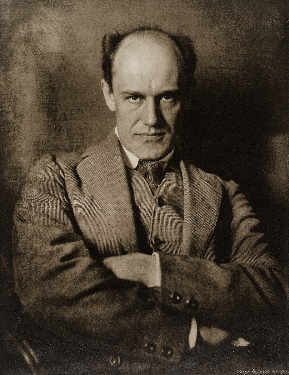 Hugo Erfurth - Portrait Walter Tiemann, 1912